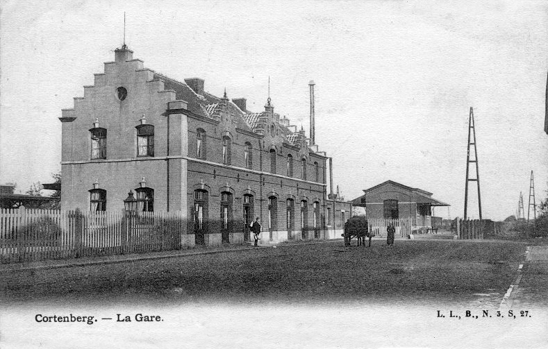 Le bâtiment voyageurs et la halle à marchandises vues de la place dans les années 1900.